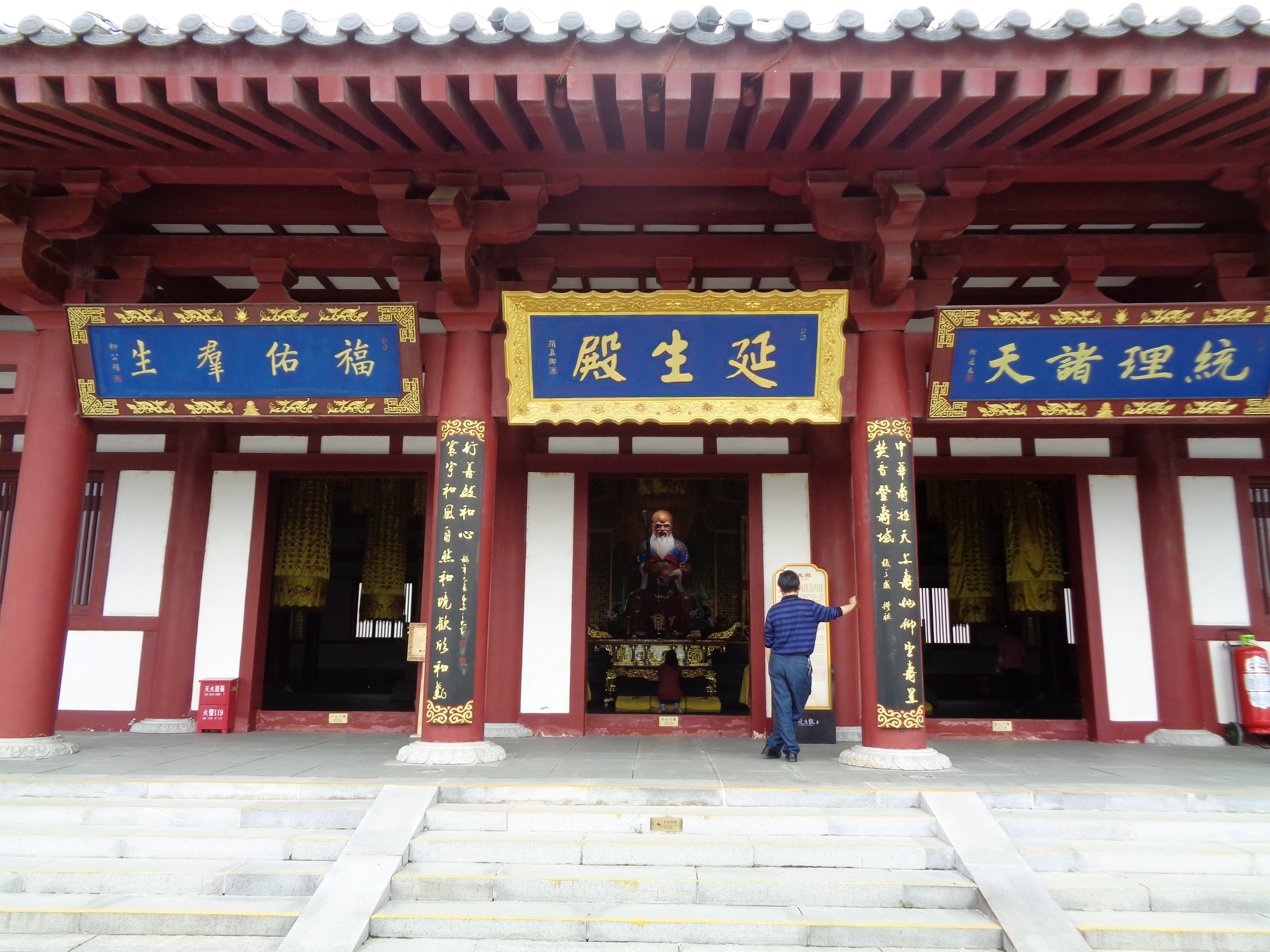 西安市周至县楼观台西约3.5公里就峪口